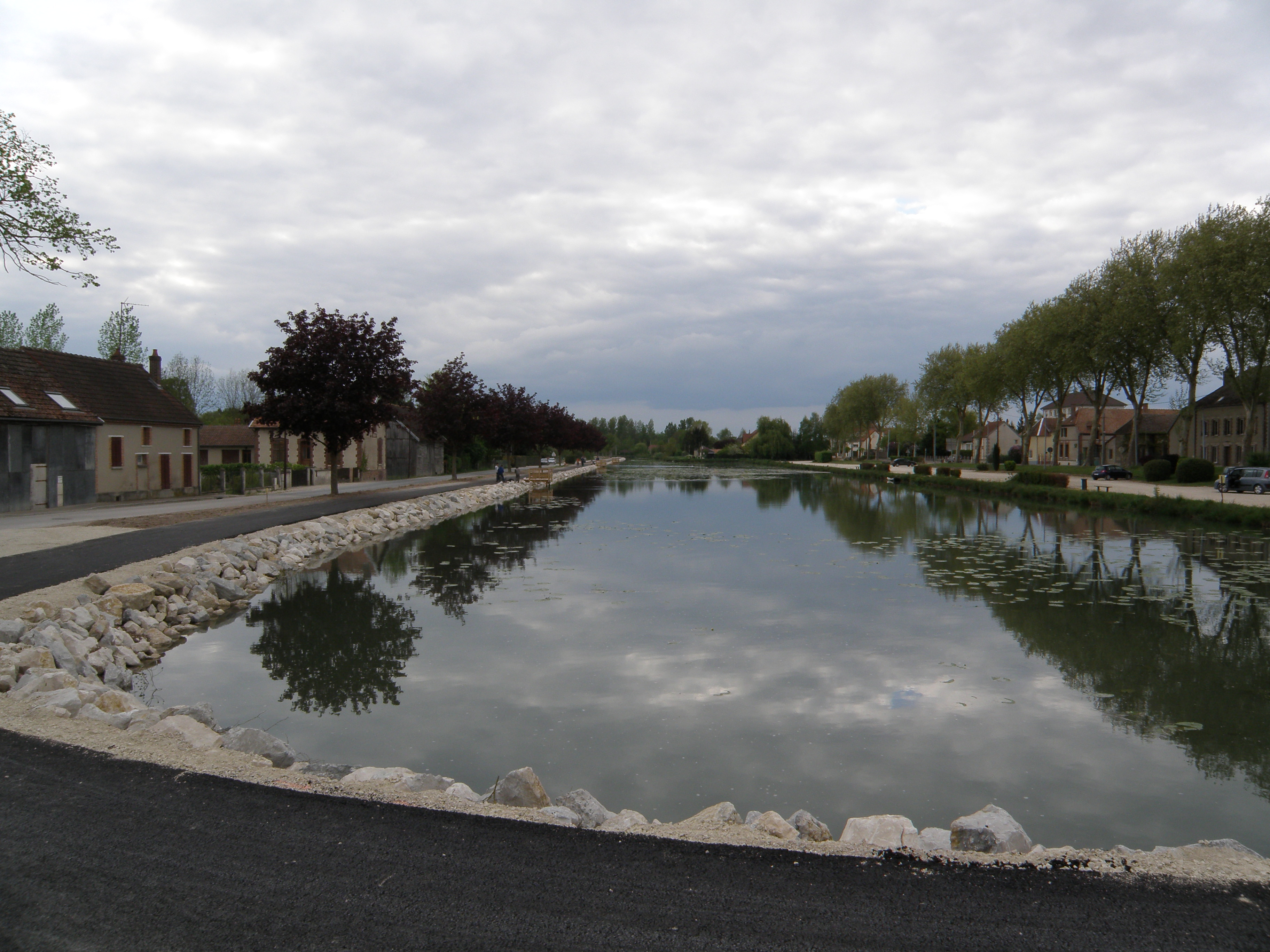 Port de Méry-sur-Seine sur le canal de la Haute-Seine. 10170 Méry-sur-Seine.